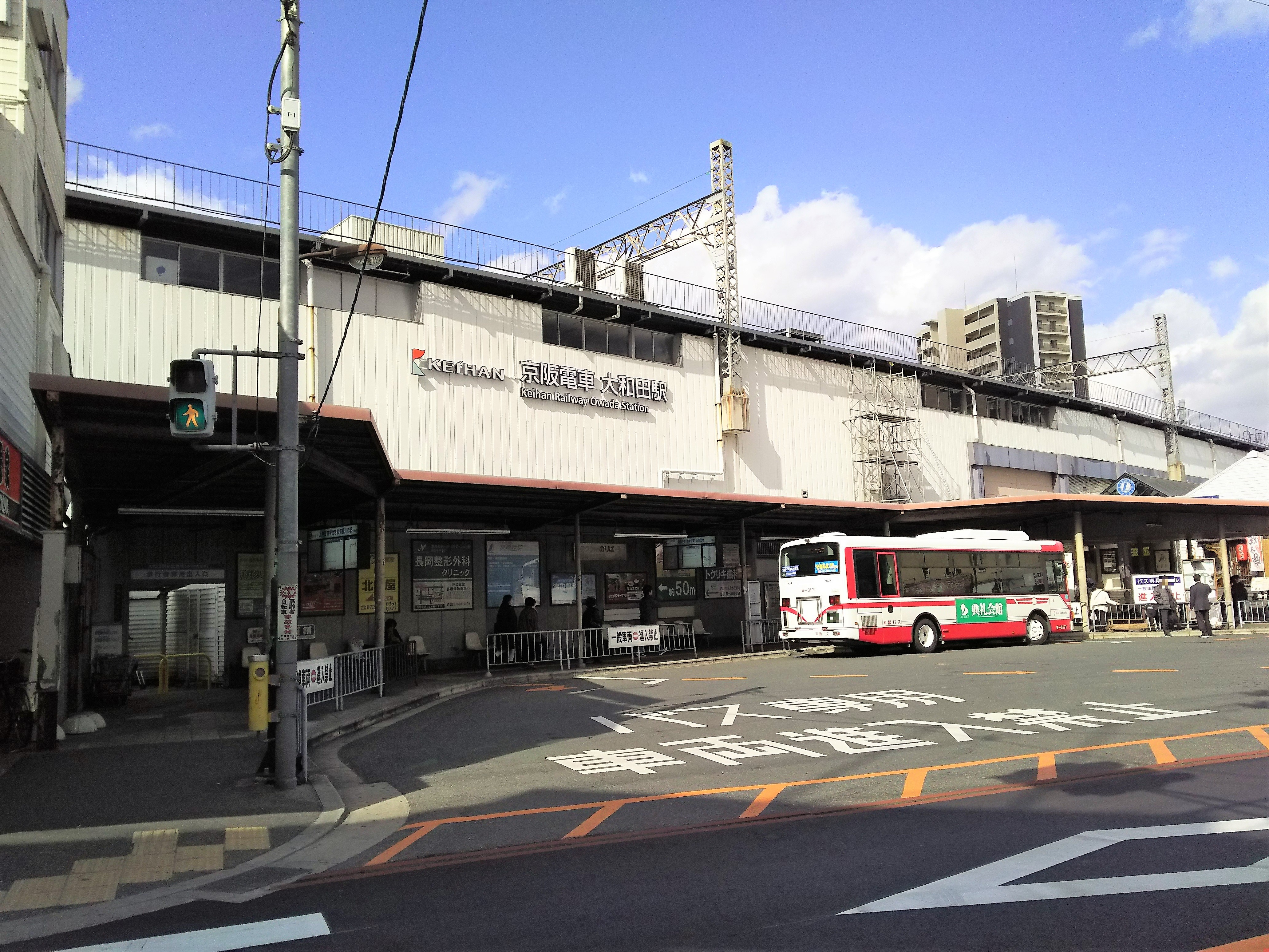 京阪本線大和田駅南口（大阪府門真市）